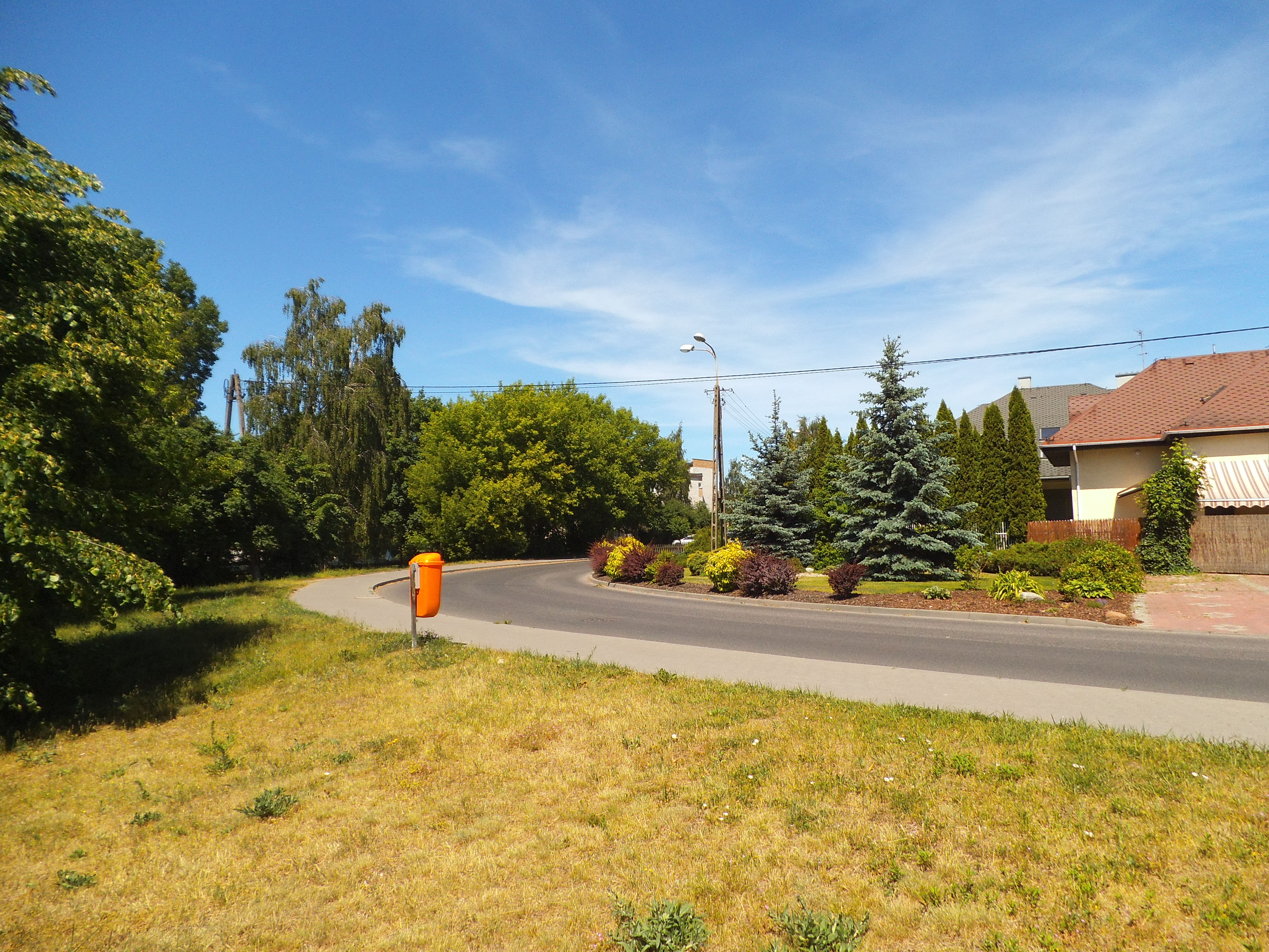 Fragment ulicy Storczykowej w Toruniu